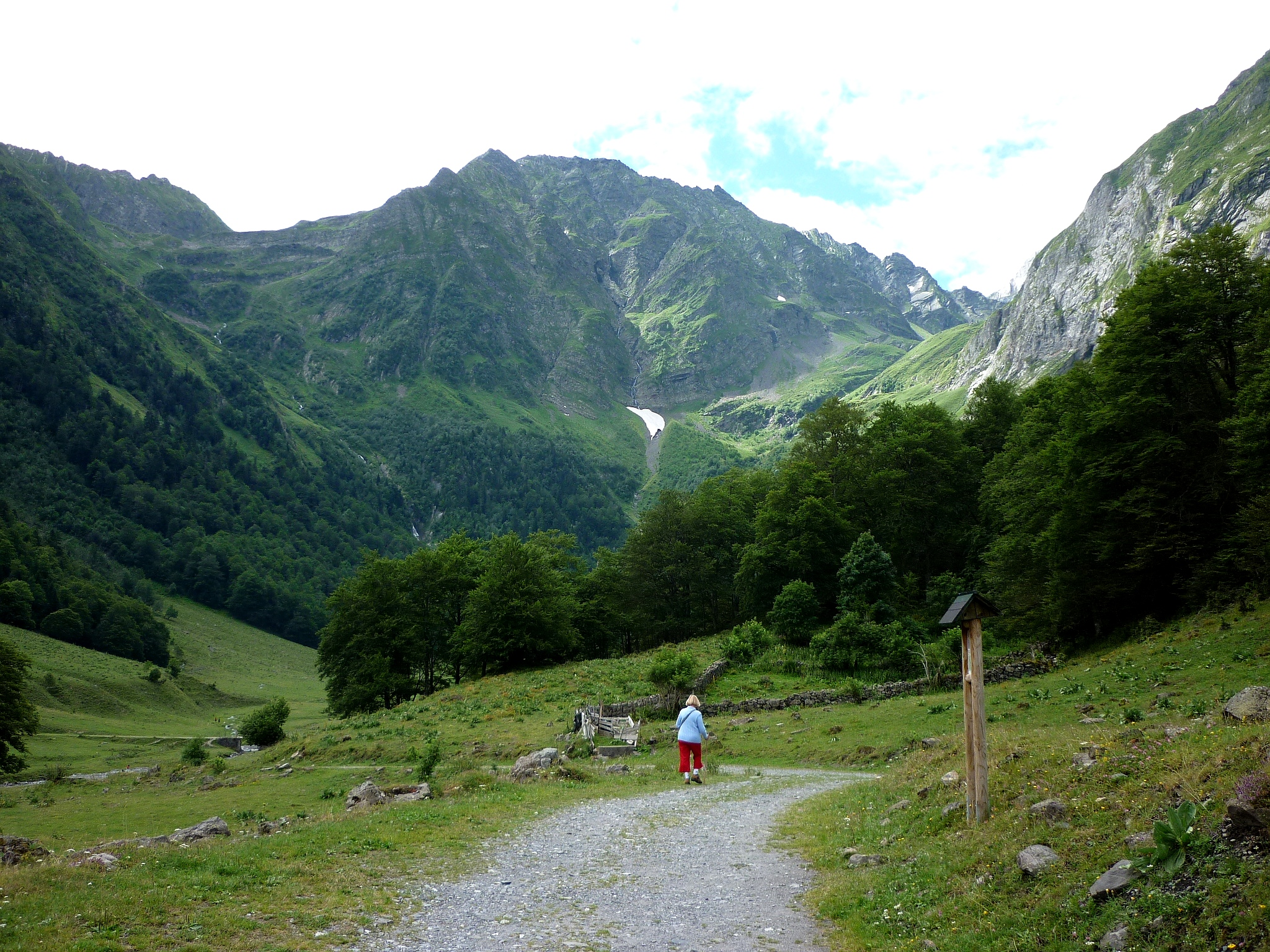 Tuc des Neres des de l'Artiga de Lin (Vall d'Aran) This is a a photo of a natural area in Catalonia, Spain, with id: ES510088